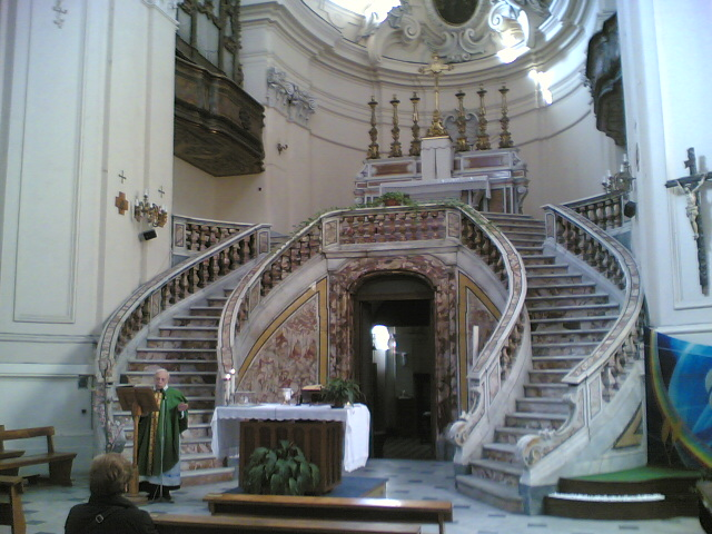 Scorcio dell'interno Sant'Anna a Capuana, Napoli